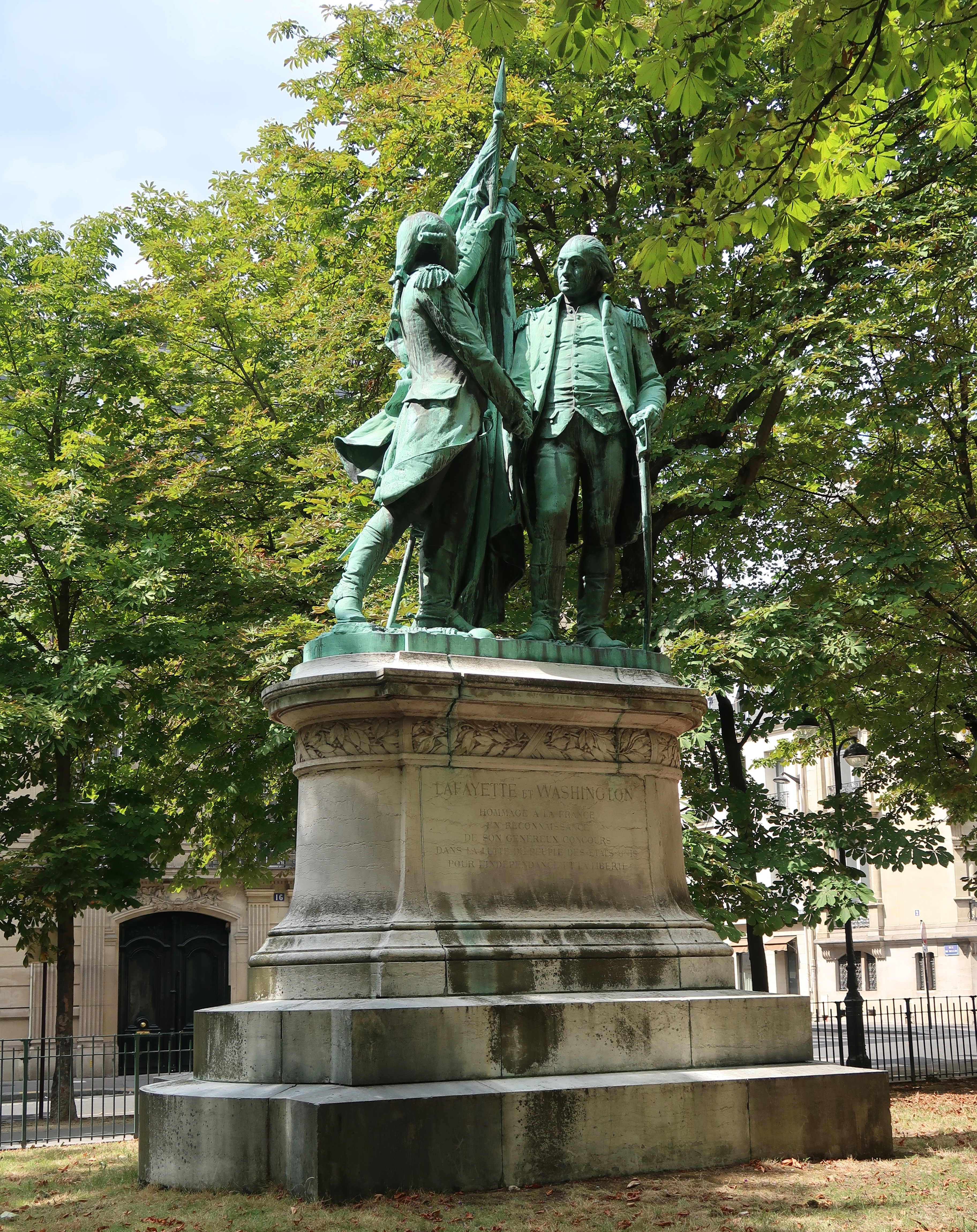 Groupe en bronze de Bartholdi (1890) - sur le socle : « La Fayette et Washington Hommage à la France en reconnaissance de son généreux concours dans la lutte du peuple des États-Unis pour l'indépendance et la liberté ». En haut de la place des États-Unis (Paris, 16e).